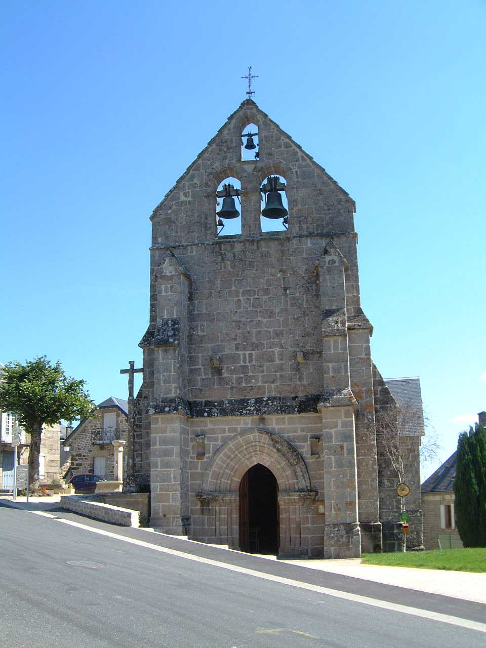 Vue de l'église de chez Gambelon (Le Bourg)